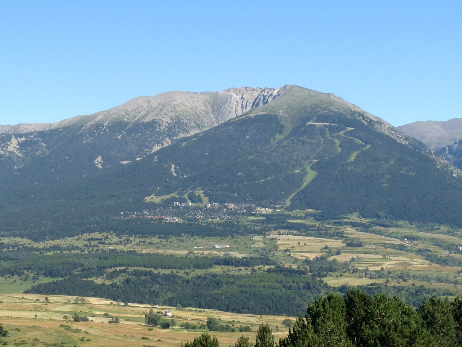 Cambre d'Aze vue depuis Font-Romeu, Pyrénées-Orientales, France